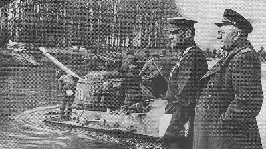 Unità corazzata sovietica attraversa la Sprea sulla strada per Berlino